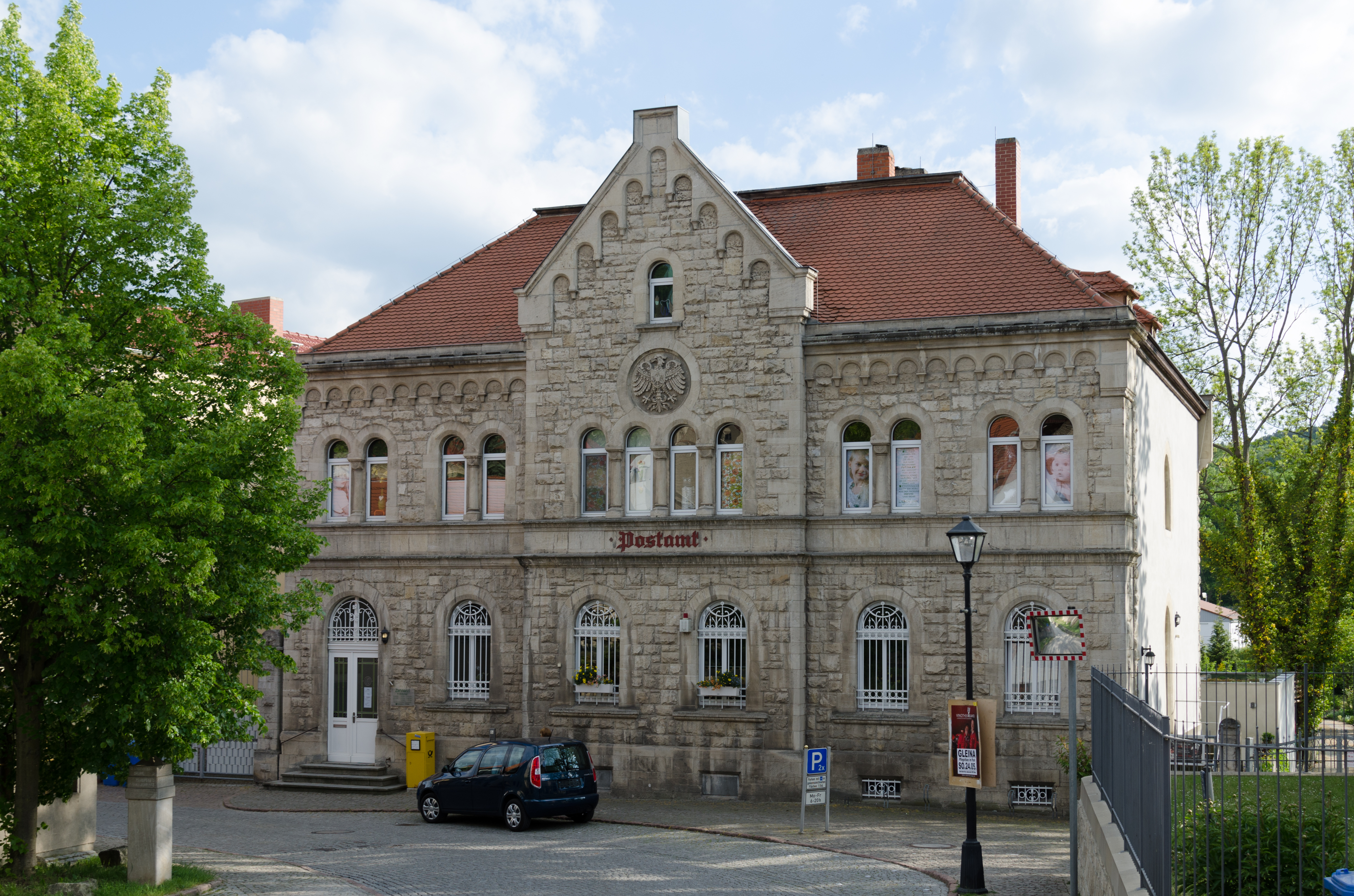 Freyburg an der Unstrut, Wasserstraße 18